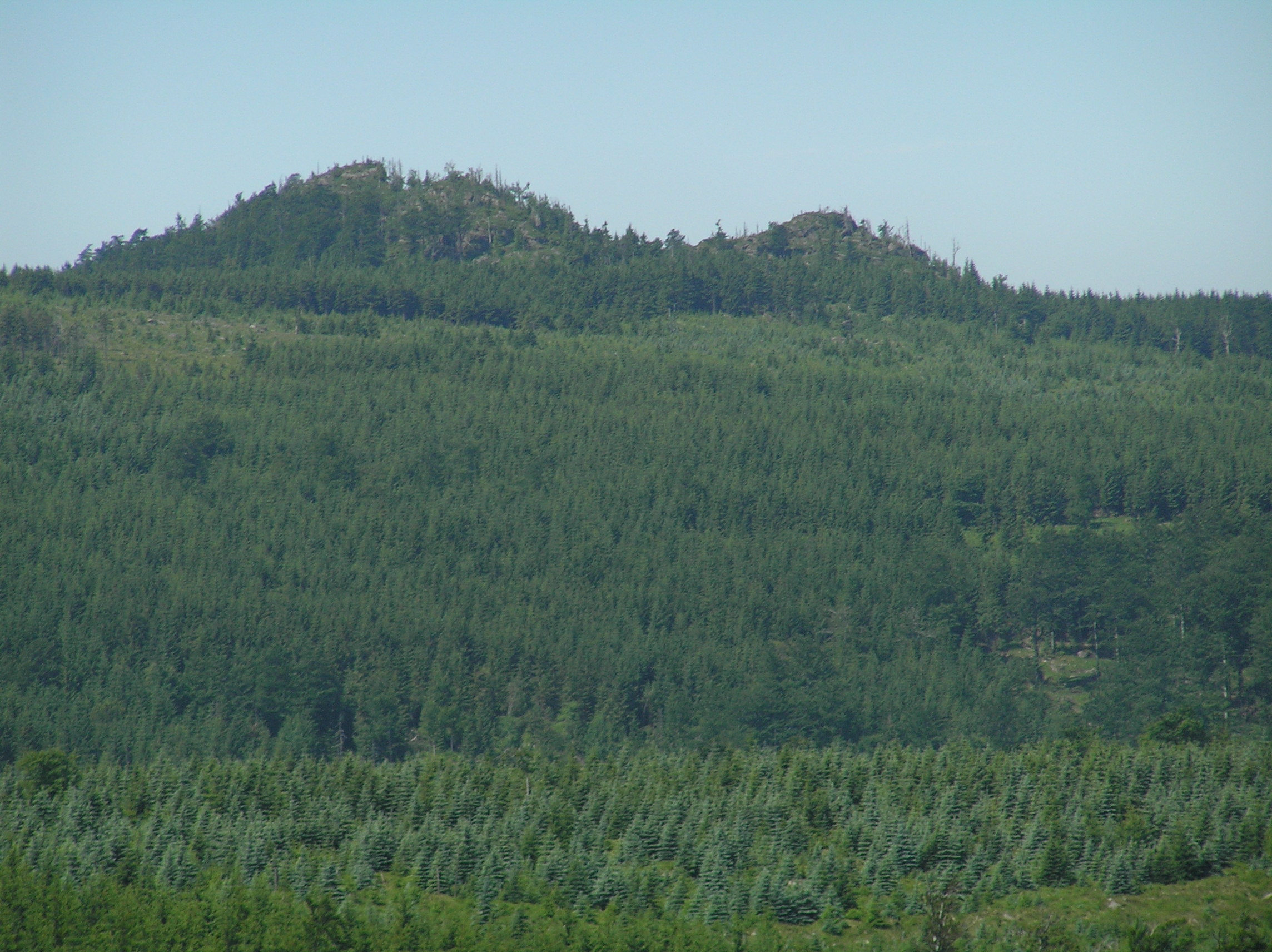 Přírodní rezervace Ptačí kupy, chránící smíšené vrcholové lesy (buk, jeřáb, smrk) a skalní útvary na stejnojmenném jizerskohorském vrcholku (1013 m).